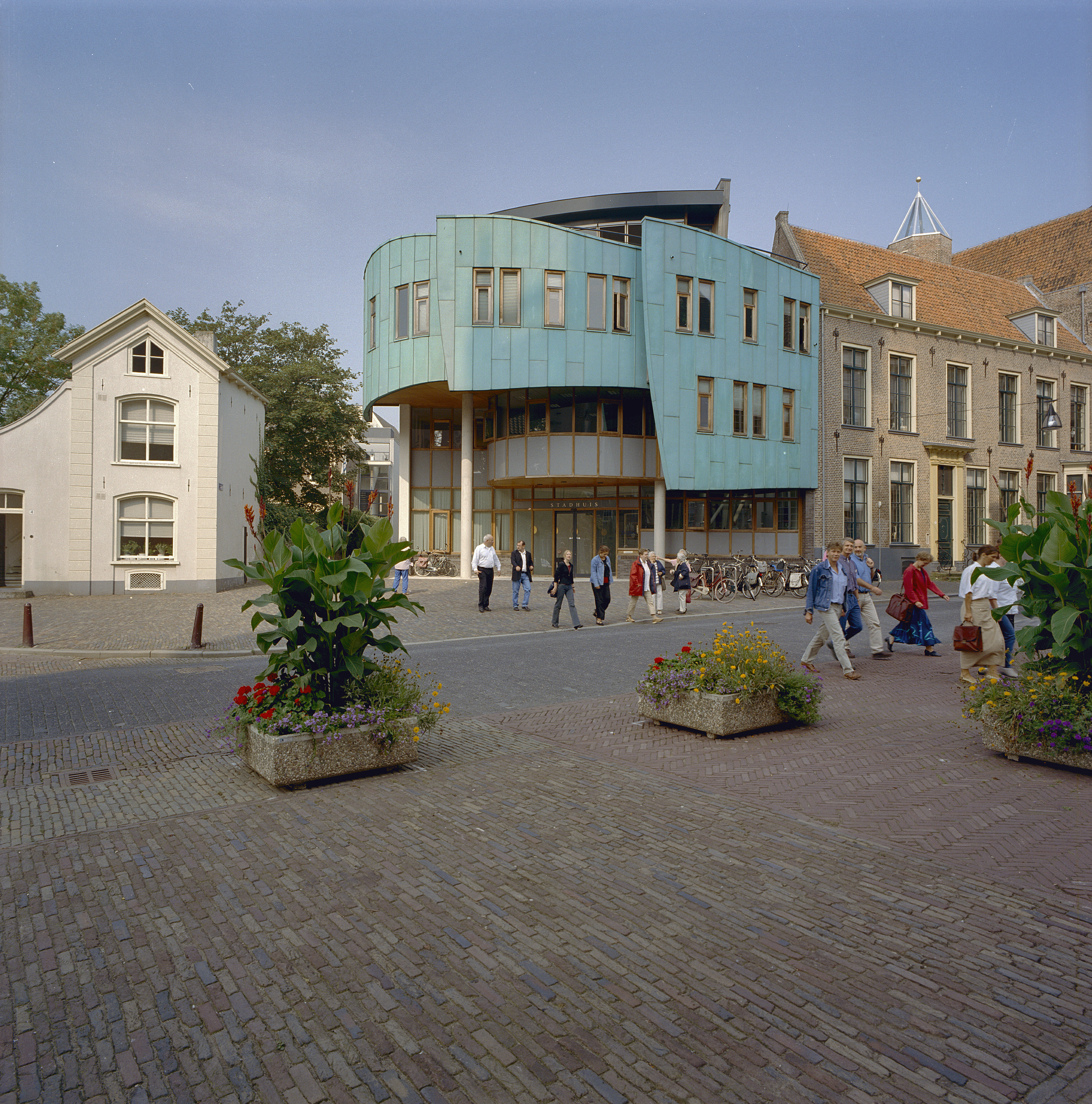 Stadhuis: Overzicht van het nieuwe stadhuis